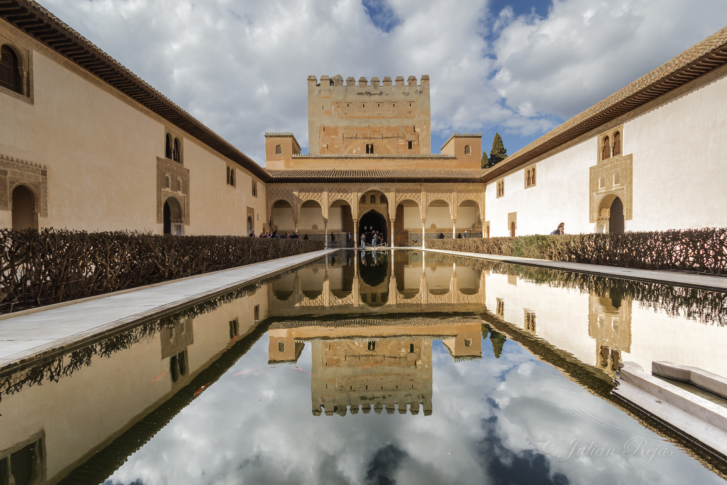 Patio de los Arrayanes, Alhambra.